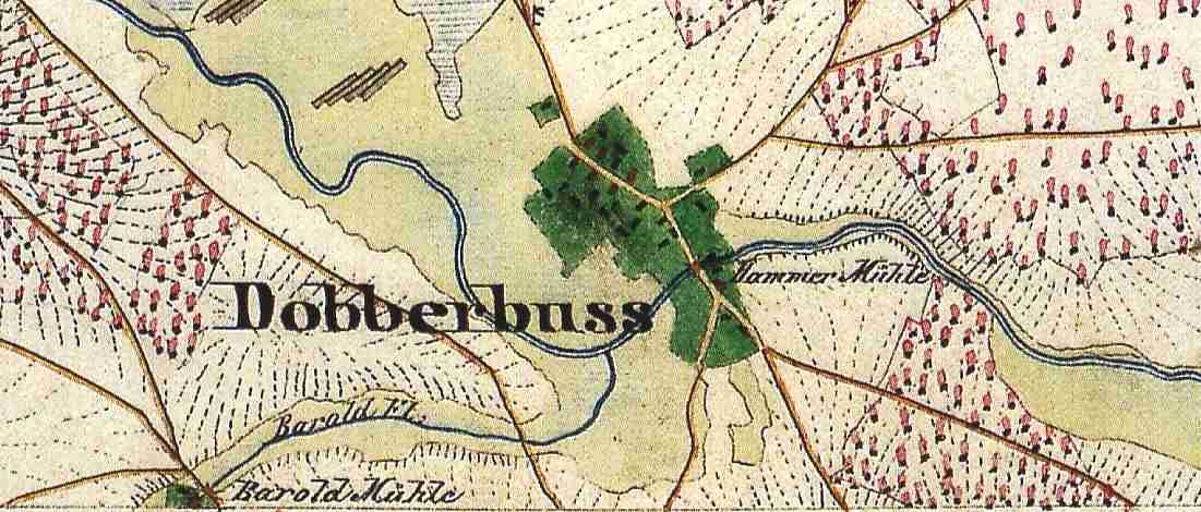 Doberburg, früher Dobberbus, Lkr. Dahme-Spreewald, Brandenburg, Ausschnitt aus dem Urmesstischblatt Blatt 3951 Trebatsch von 1846